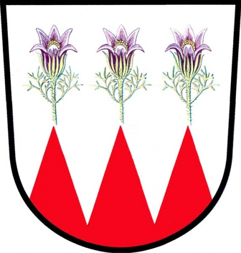 znak obce Krčmaň